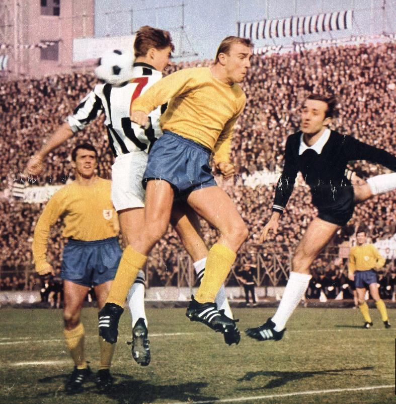 Torino (Italia), stadio Comunale, 28 febbraio 1968. L'attaccante juventino Roger Magnusson (n. 7) impegna la retroguardia avversaria, sotto lo sguardo del portiere sassone Horst Wolter a sua volta proteso in volo (a destra), nella sfida tra Juventus ed E. Braunschweig (1-0) valevole per il ritorno dei quarti di finale della Coppa dei Campioni 1967-1968; stante il successo tedesco (3-2) nella gara di andata giocata in Germania Ovest il precedente 31 gennaio, dato il regolamento dell'epoca le due squadre andarono allo spareggio, disputatosi in campo neutro a Berna il 20 marzo seguente e vinto dai torinesi (1-0), i quali passarono così il turno accedendo per la prima volta nella loro storia alle semifinali della principale competizione europea per club. Magnusson era appellato dai media italiani come l'attaccante «di coppa» della Juventus poiché, stante l'allora blocco del calcio italiano verso l'utilizzo di giocatori stranieri nei campionati nazionali, lo svedese poté essere schierato dai piemontesi unicamente nelle manifestazioni europee.